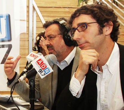 Los periodistas chilenos Alejandro Guillier (izquierda) y Matías del Río.